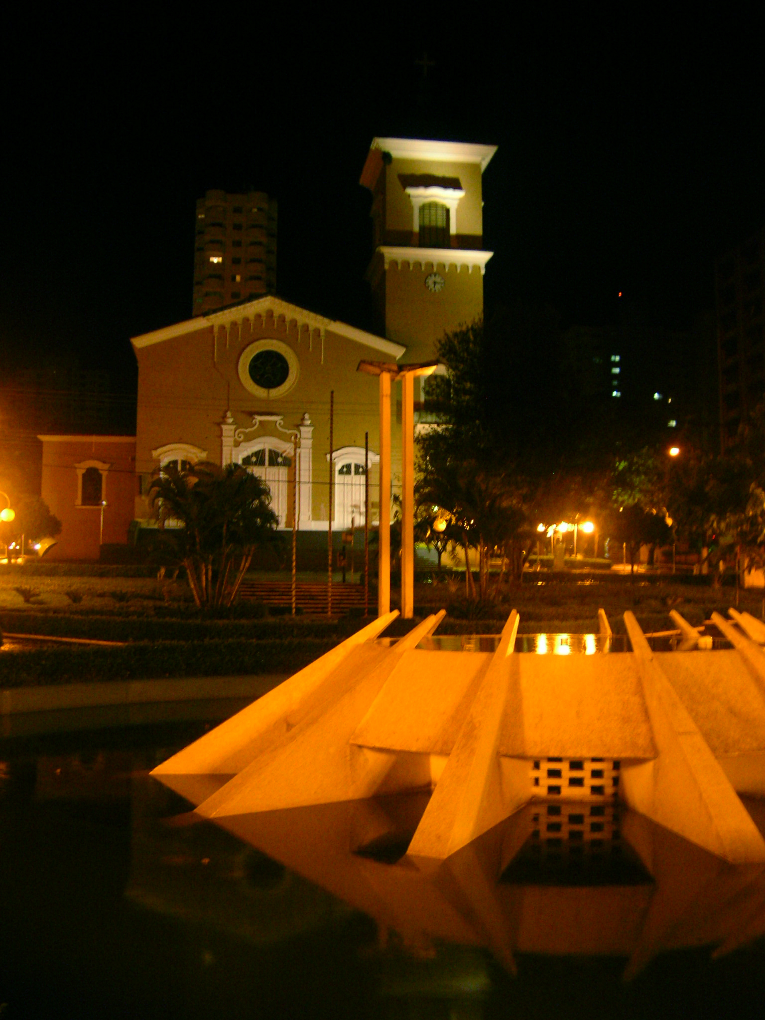 Imagem noturna da Catedral de Limeira (1949-1970)